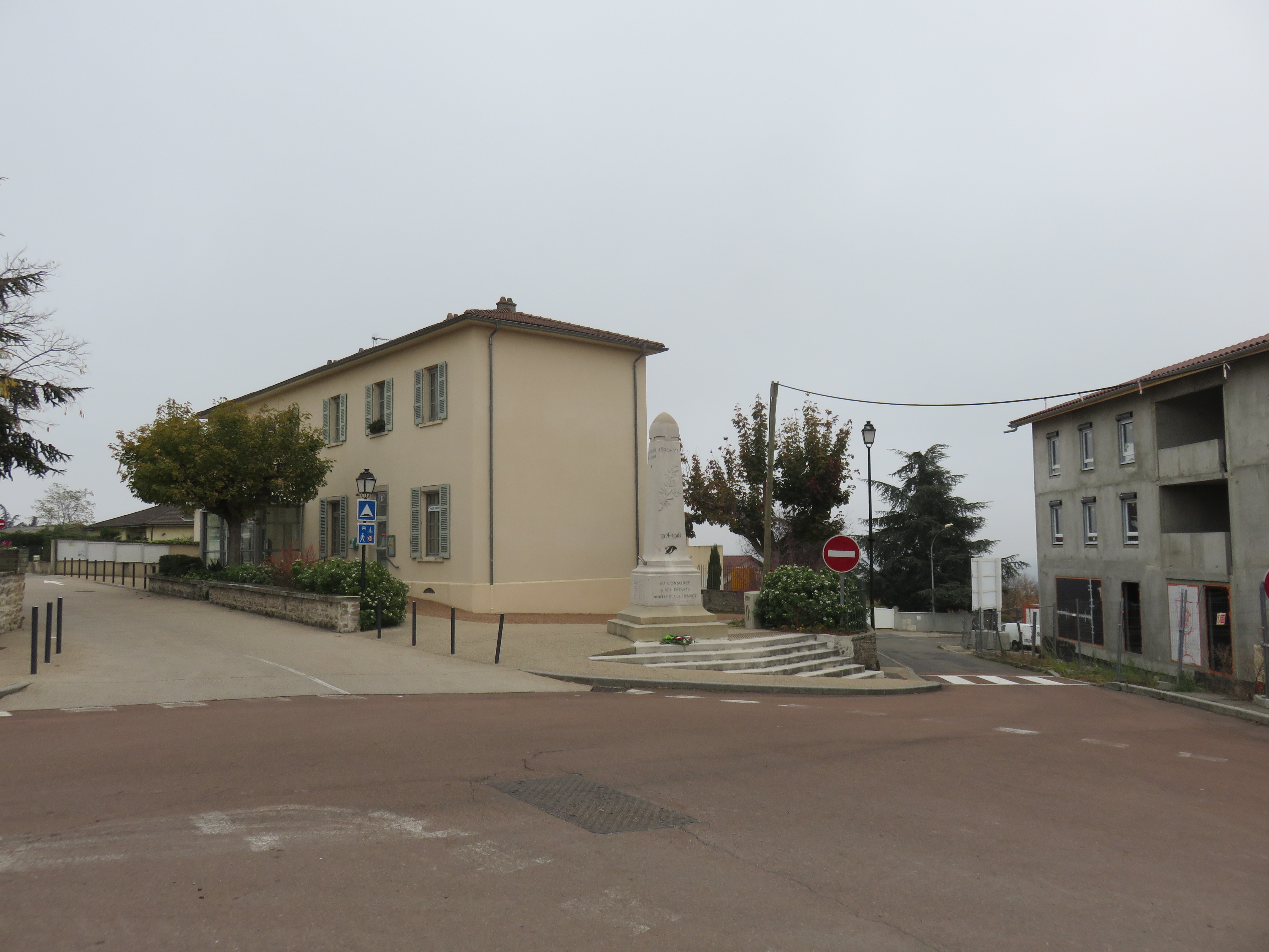 Le croisement entre les rues de Verdun et des Monts, avec au centre le monument aux morts et à gauche la mairie, à Sainte-Consorce (Rhône, France).